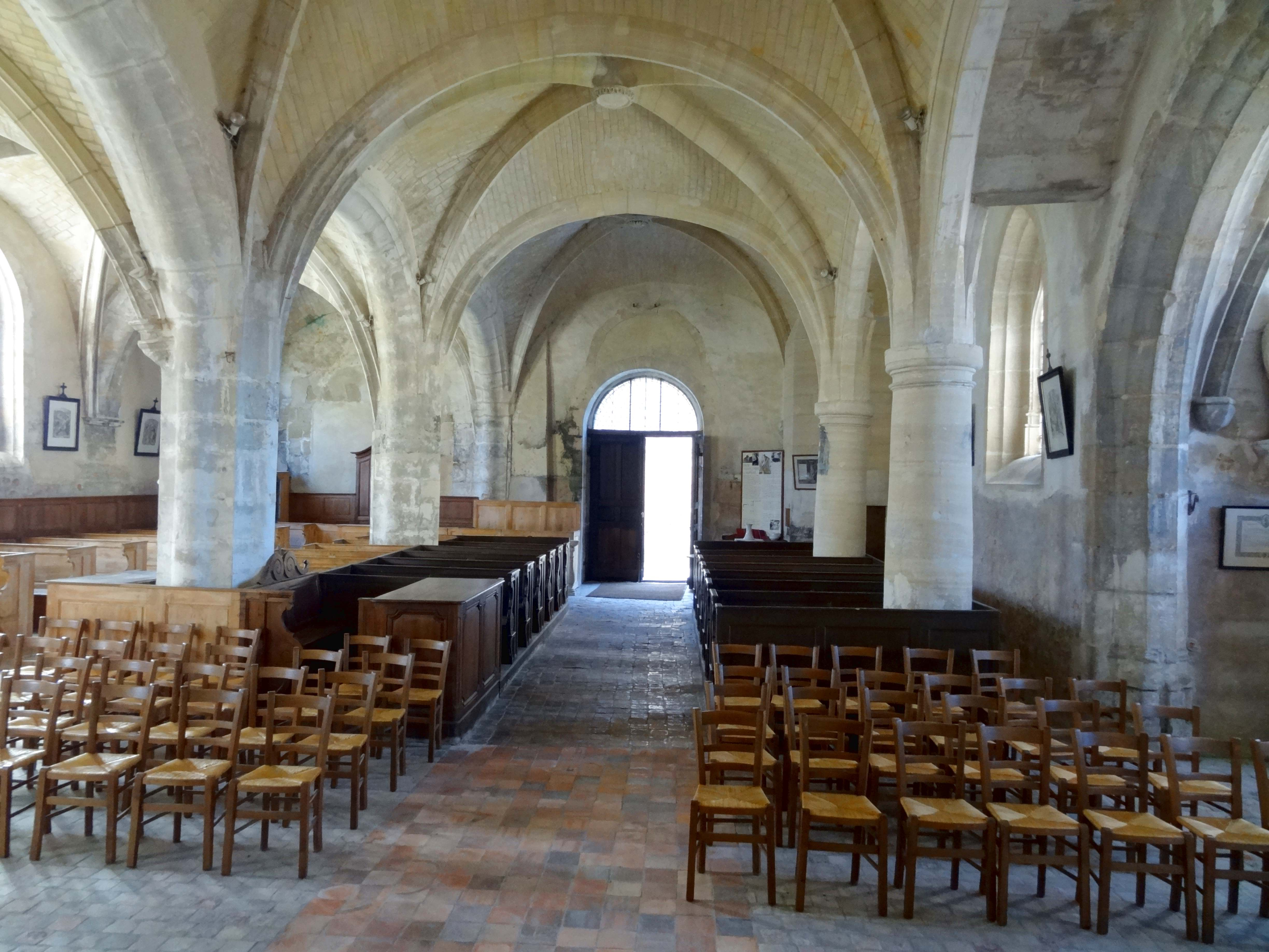 Intérieur de l'église - voir titre.